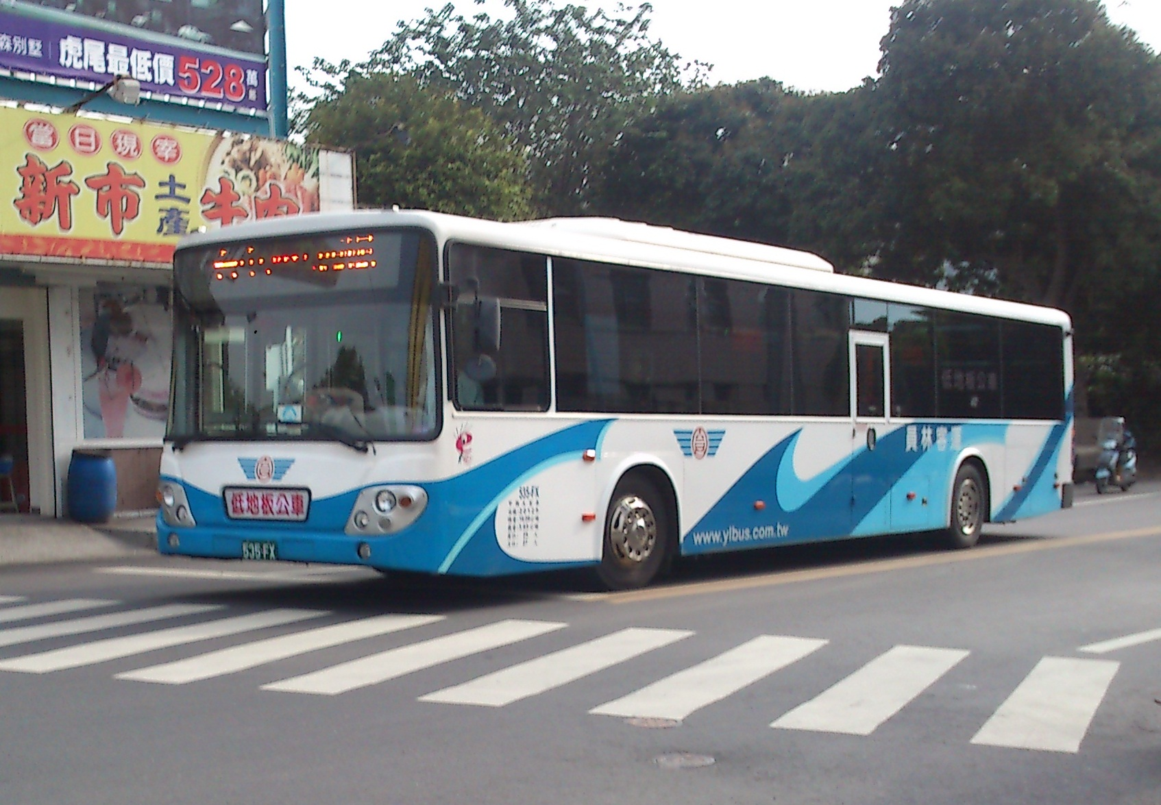 員林客運低底盤公車535-FX